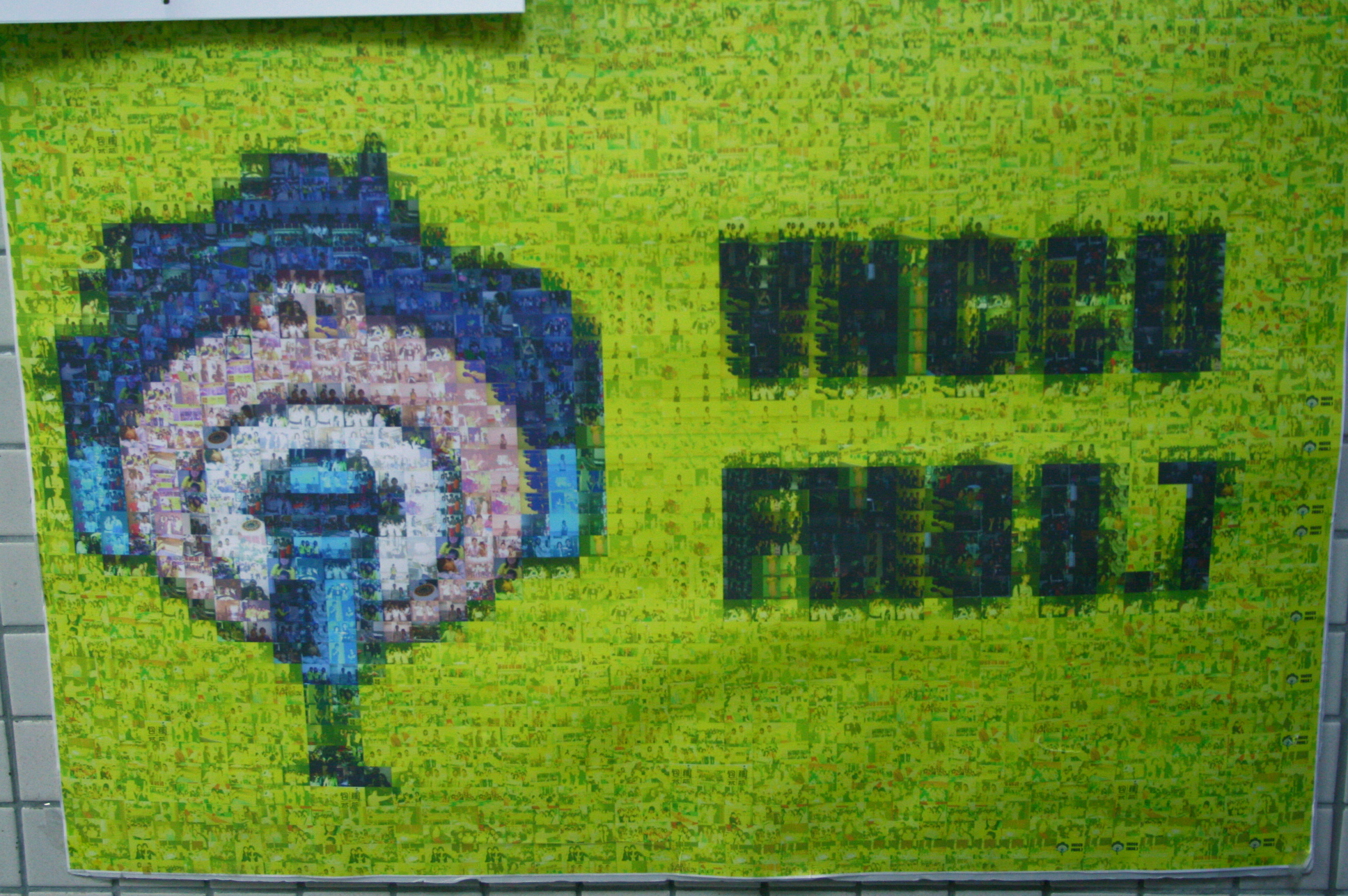 中文（台灣）: 政大之聲的馬賽克拼圖。